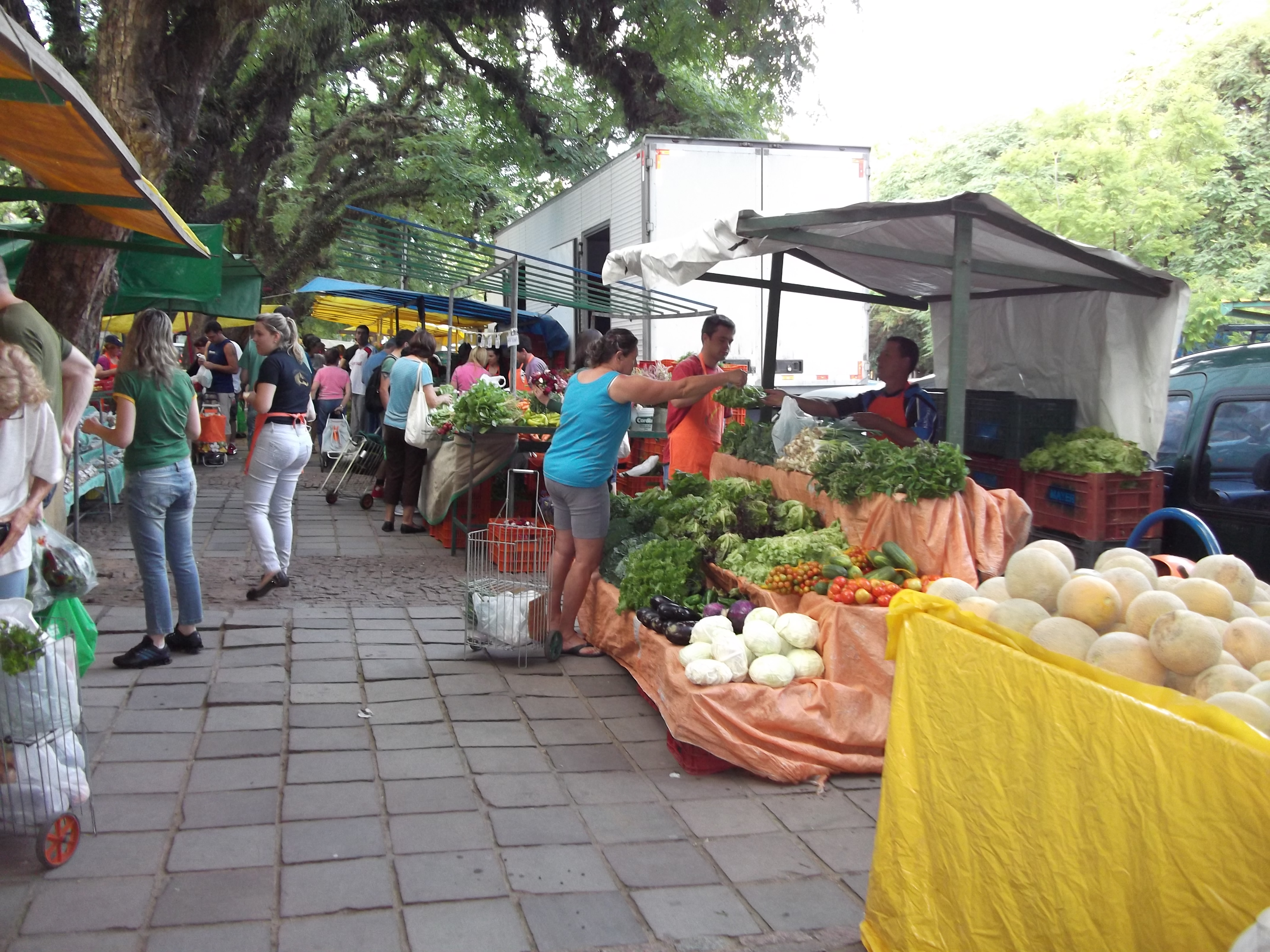 Feira Ecológica da José Bonifácio, Porto Alegre, Brasil